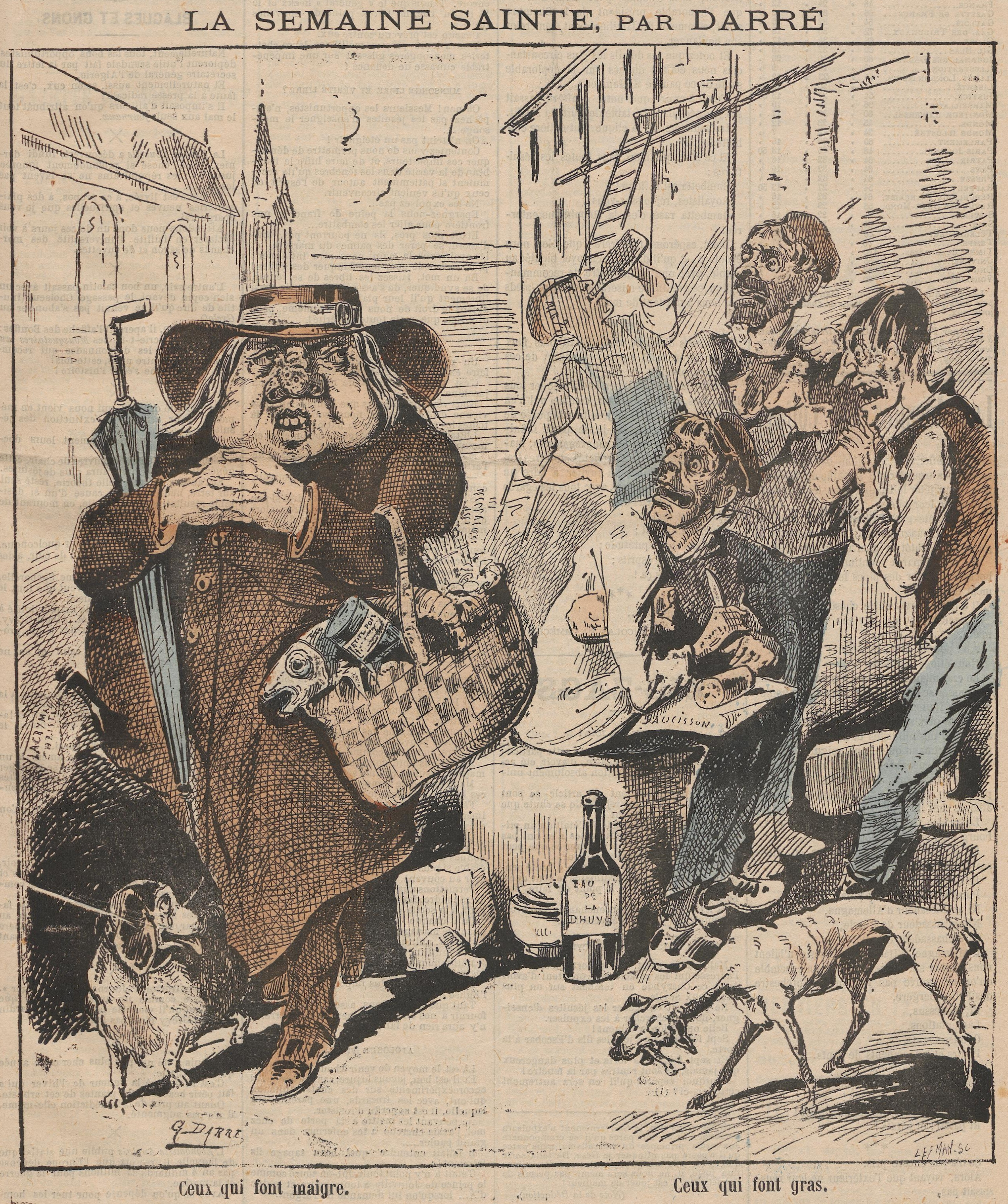 Caricature anticléricale critiquant la fausse sobriété de l’Église catholique.